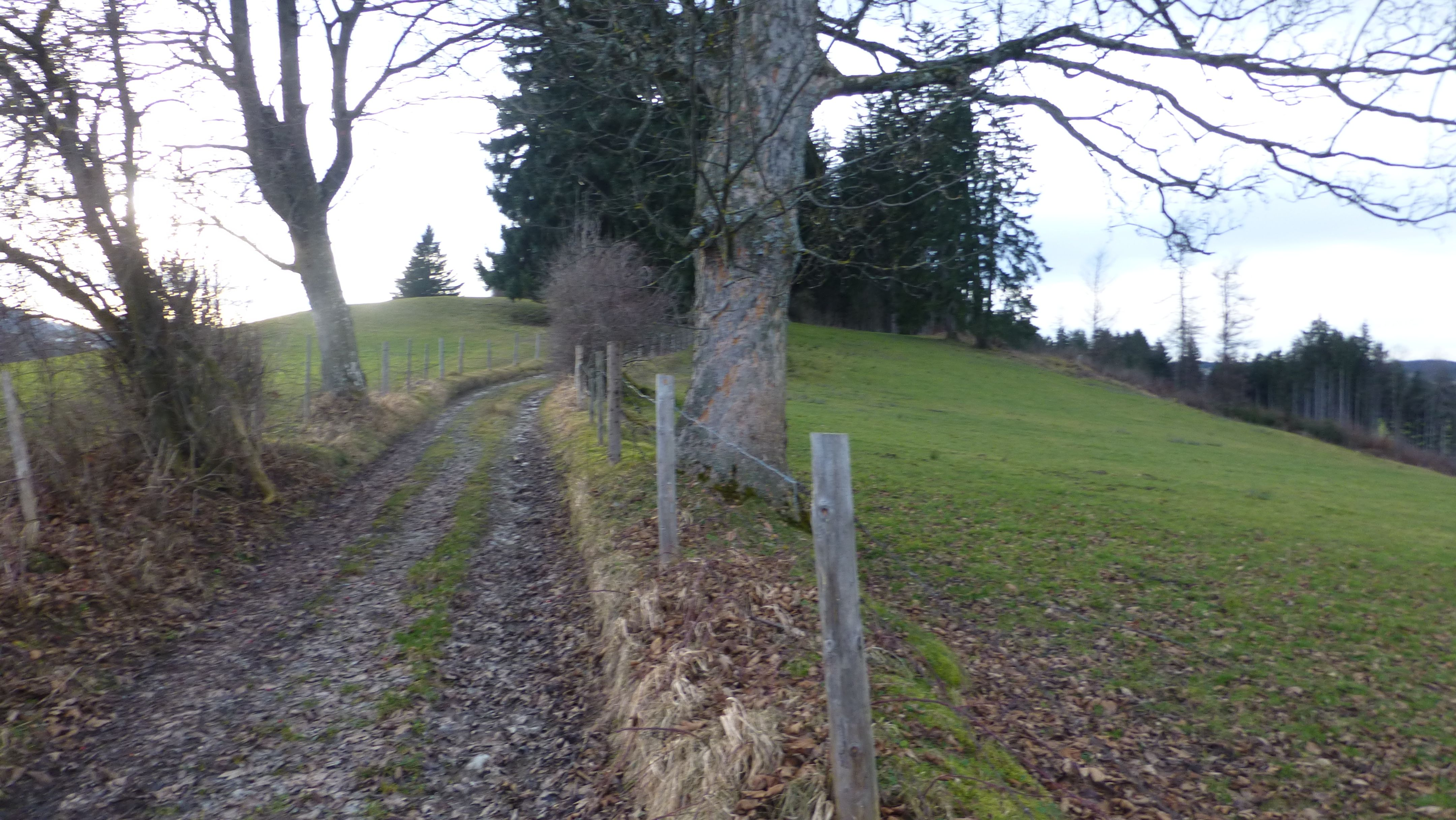 Vermutlicher Standort der Burg Falkensberg in der Gemeinde Rückholz (Ostallgäu)